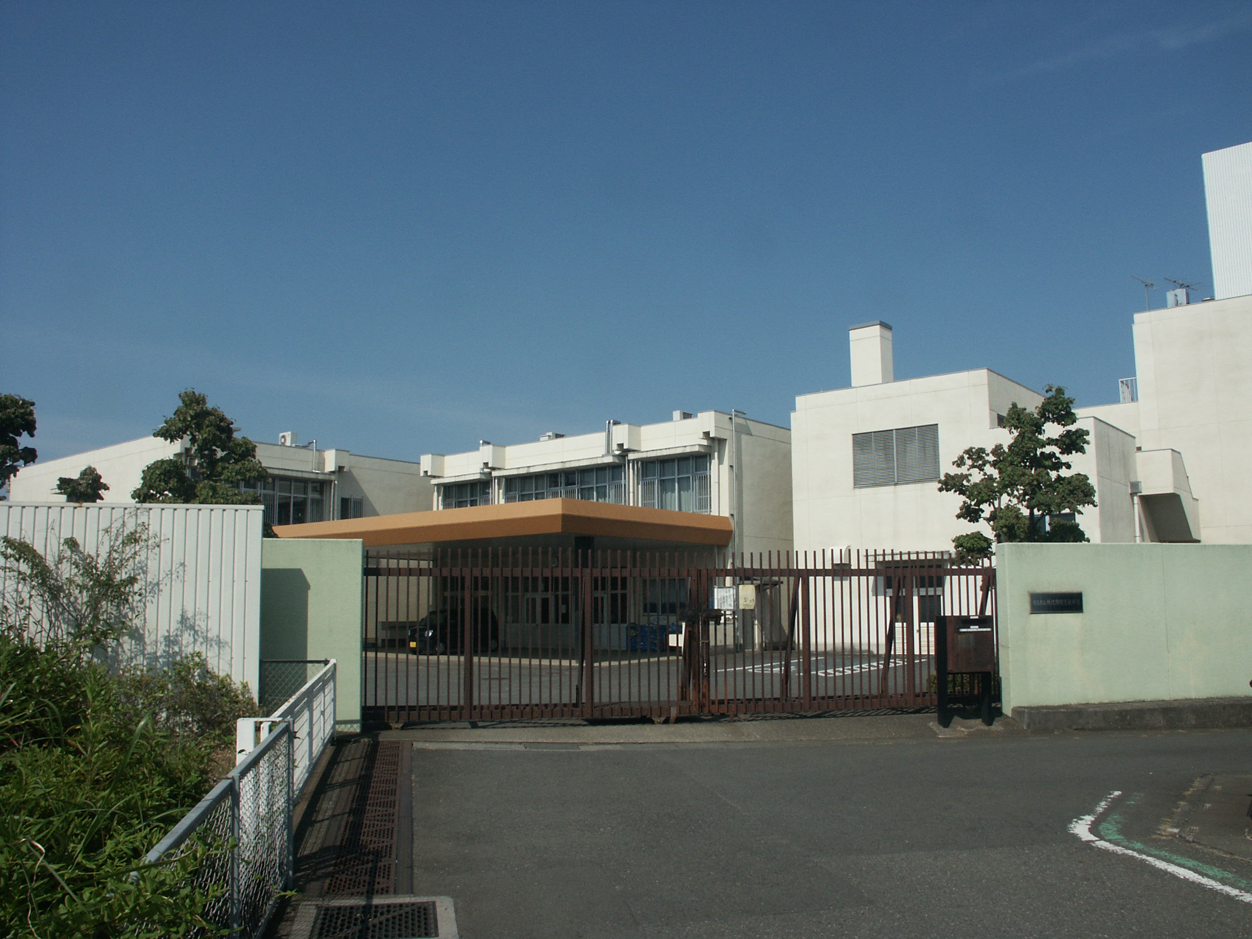 埼玉県立所沢特別支援学校校舎